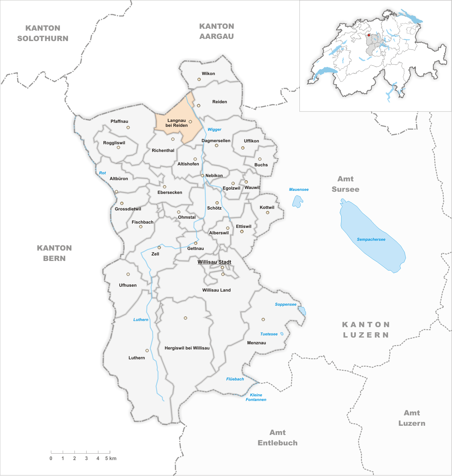 Municipality Langnau bei Reiden Artist: Tschubby